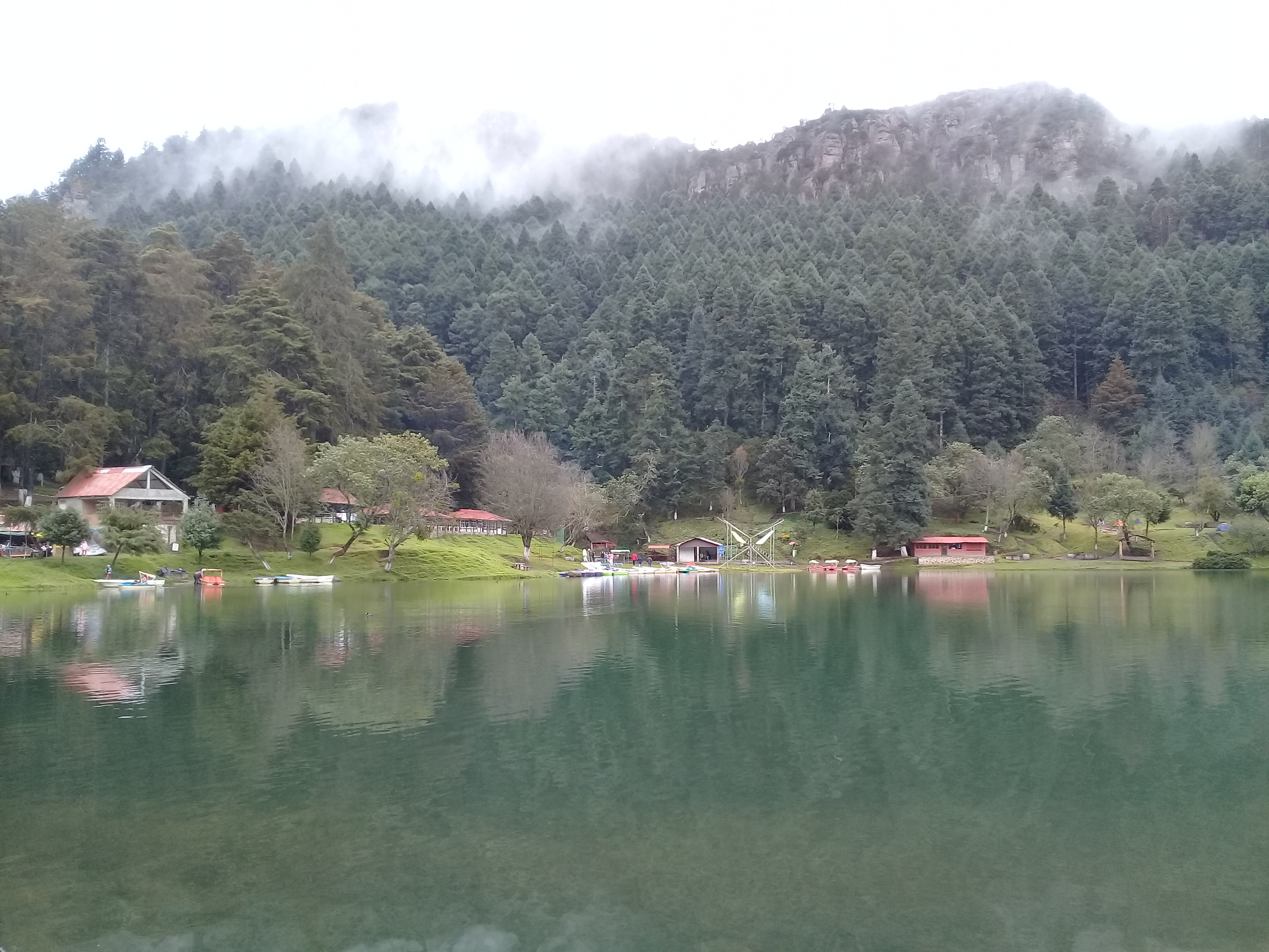 Lago artificiale presso la diga El Cedral in località La Estanzuela, nel comune di Mineral del Chico, nello Stato di Hidalgo in Messico.